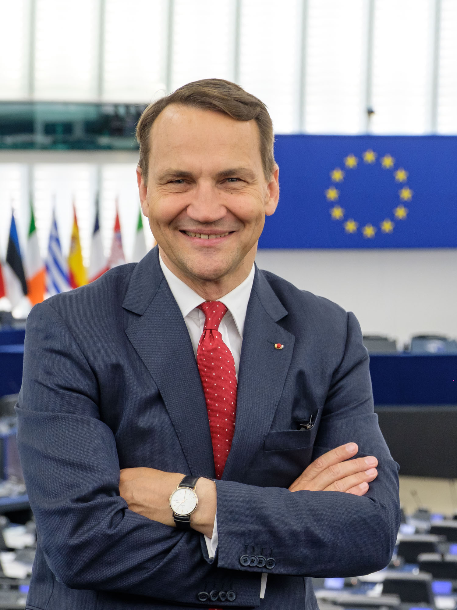 Były szef MON i MSZ, europoseł Radosław Sikorski w Parlamencie Europejskim w Strasbourgu.